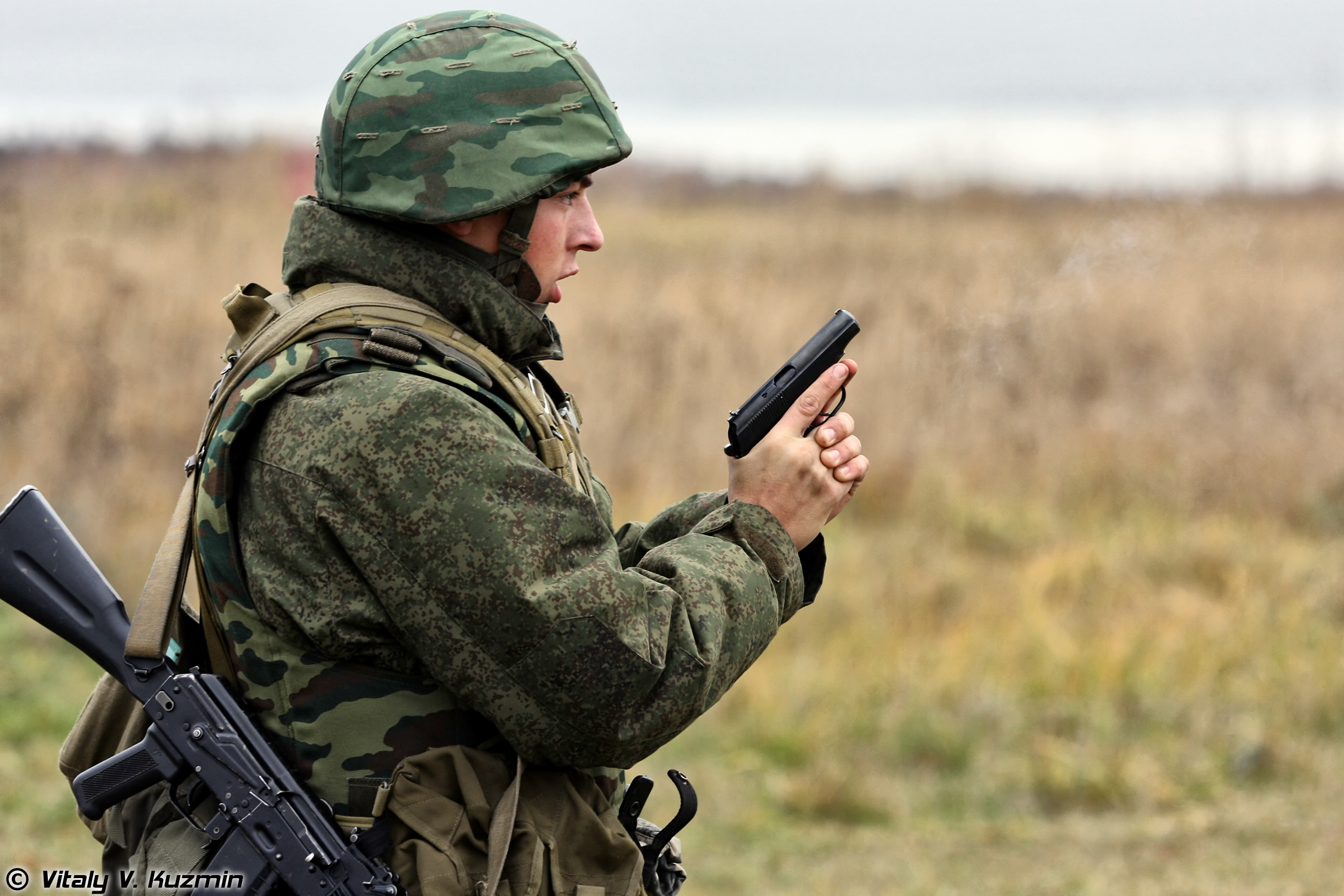 Десантник с ПМ и АК-74М